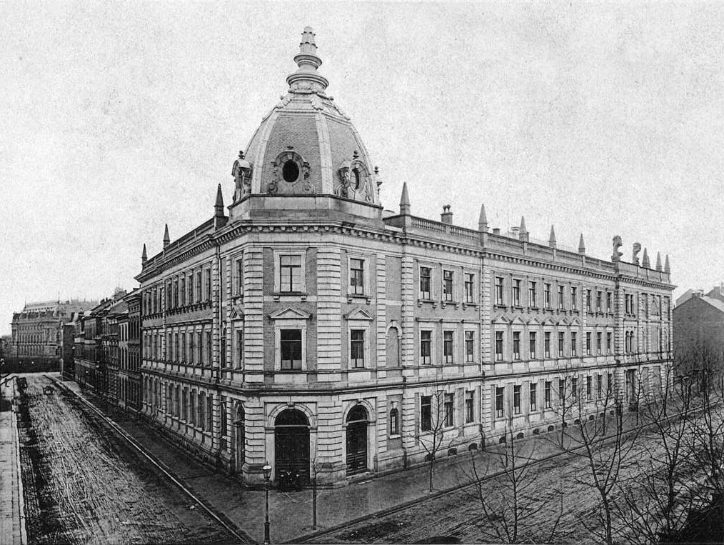 Höhere Bürgerschule (Oberrealschule) am Fürstenwall 100 (damals Nr. 92–116) an der Ecke zur Florastraße. Feier zur Einweihung des neuen Schulgebäudes Ostern 1888.